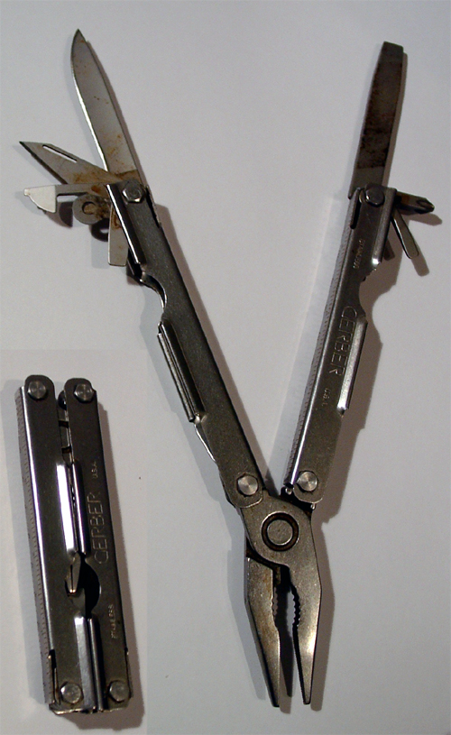 Ein "Leatherman" der Firma Gerber im zusammengefalteten und ausgeklappten Zustand. Selbst fotografiert